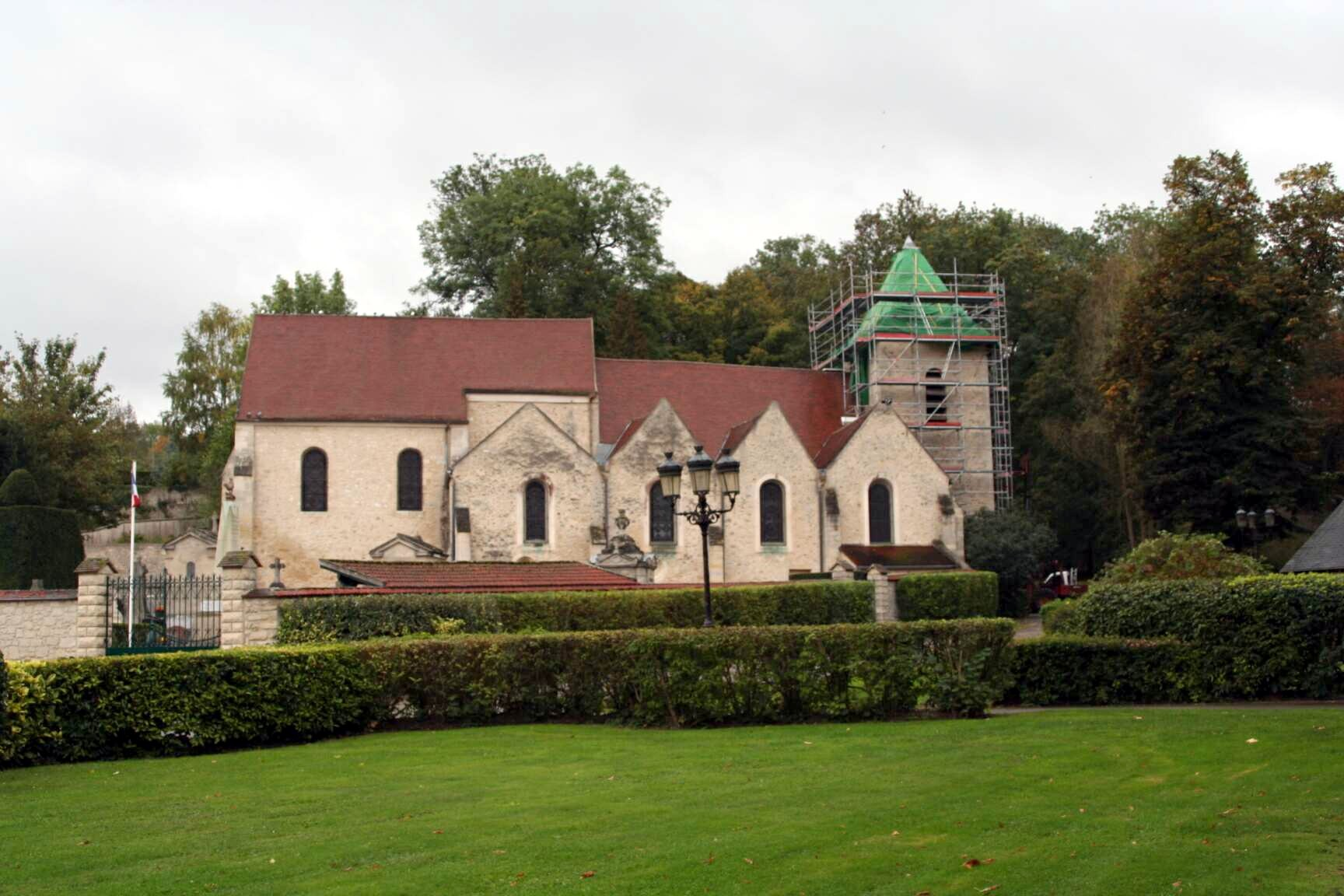 Église de Flins-sur-Seine - Yvelines (France)